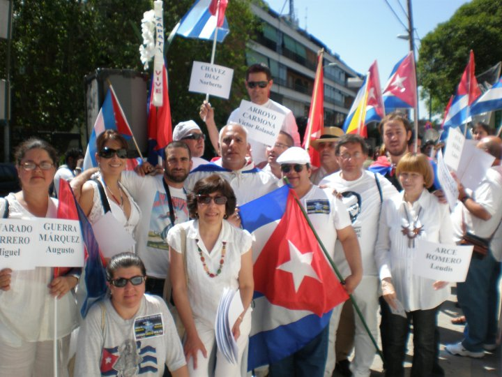 Kubanoj en Madrido protestas antaŭ la Ambasadejo de Kubo por la liberigo de disidentoj de la Nigra Printempo en Kubo, tenante afiŝojn kun iliaj nomoj.